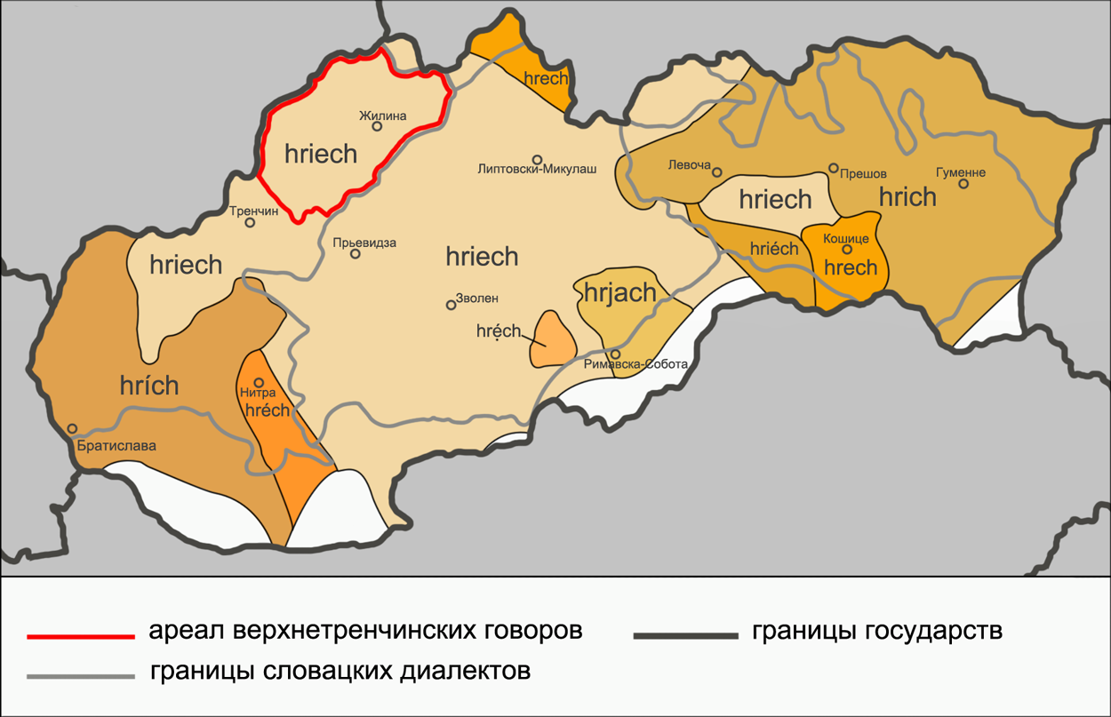 Континуанты ē в словацких диалектах (c указанием верхнетренчинского ареала) на примере слова hrieh. Источники: Pauliny E. Fonologický vývin slovenčiny. — Bratislava: Slovenské pedagogické nakladateľstvo, 1963. — 360 S. — s. 222